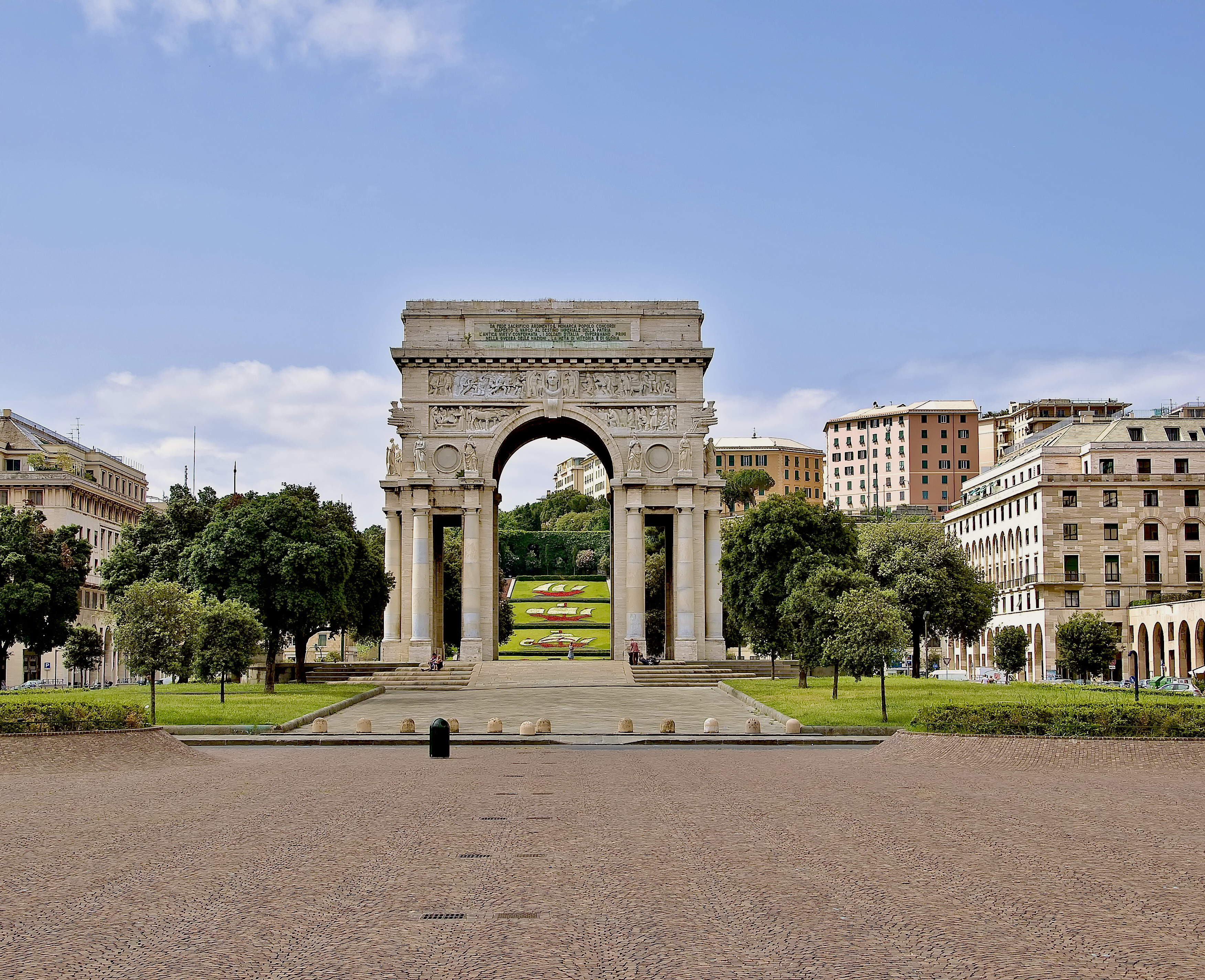 Genova, Arco di Trionfo This is a photo of a monument which is part of cultural heritage of Italy.